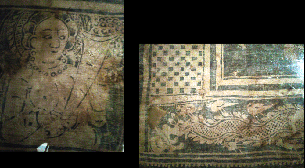 Fragment de textile, époque des Han de l'Est. Coton teint en bleu selon la technique du batik. Deux parties de la surface totale, qui est de 85 x 48 cm. Découvert en 1959, tombe 1, site de Niya, Minfeng, province du Xinjiang. Musée de la Région autonome ouïghoure du Xinjiang. Ref. : Exposition « Splendeur des Han. Essor de l'Empire Céleste » 2014-2015 Musée Guimet, Paris. ISBN 978-20-81348-84-4. Page 158 : représentation d'un bodhisattva féminin tenant un récipient en forme de corne débordant de raisins. Partie de droite : un dragon entouré d'oiseaux et de poissons. Formes artistiques mêlées : hellénistiques, romaines iraniennes, et d'Asie centrale sur des thèmes indiens.